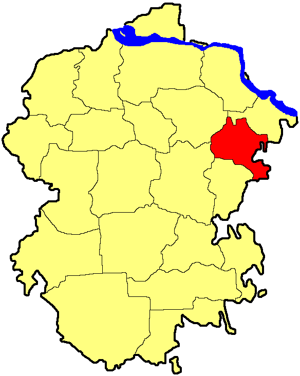 Урмаринський район Чувашії